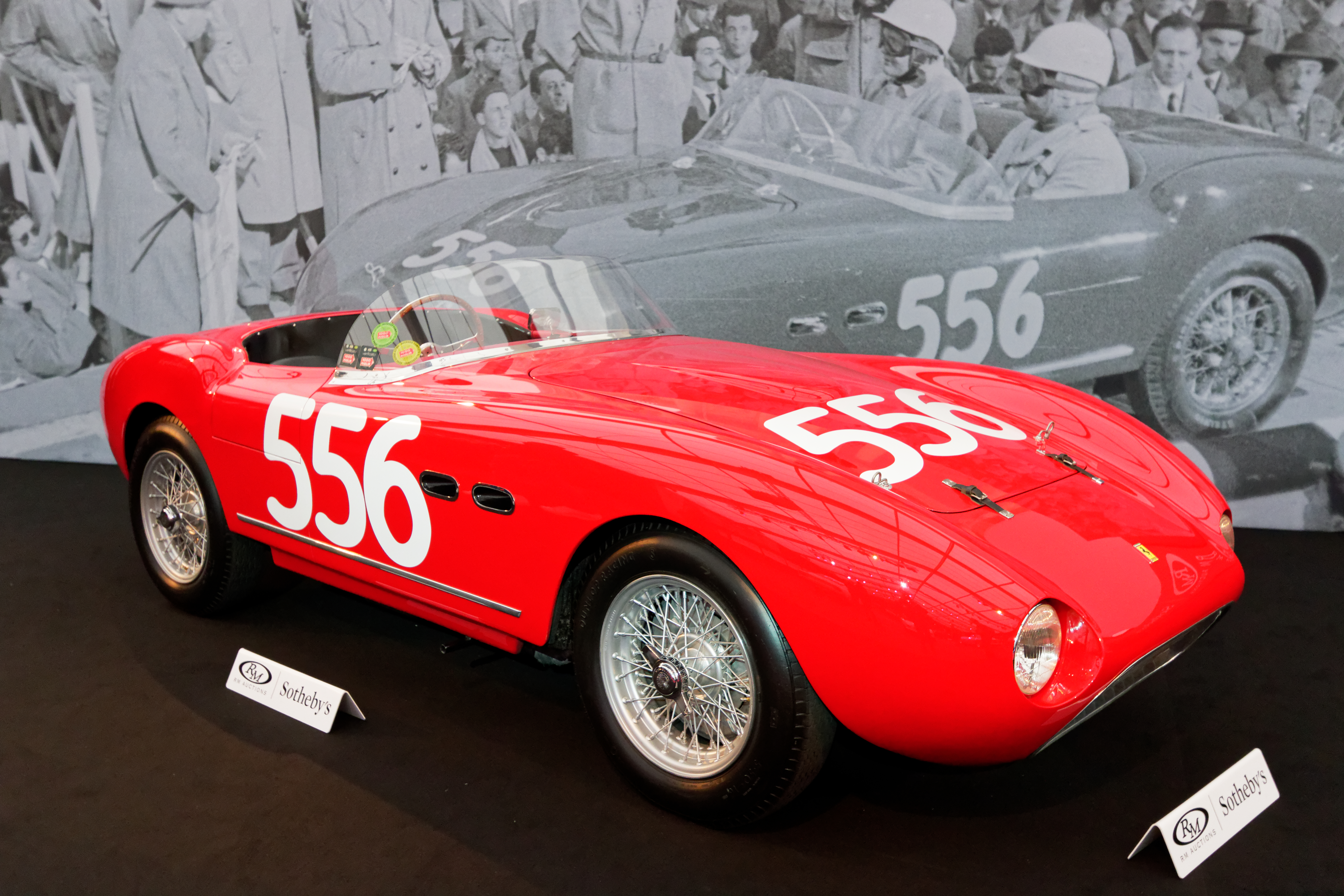 Un véhicule exposé lors de la vente RM Sotheby’s 2018 aux Invalides à Paris.